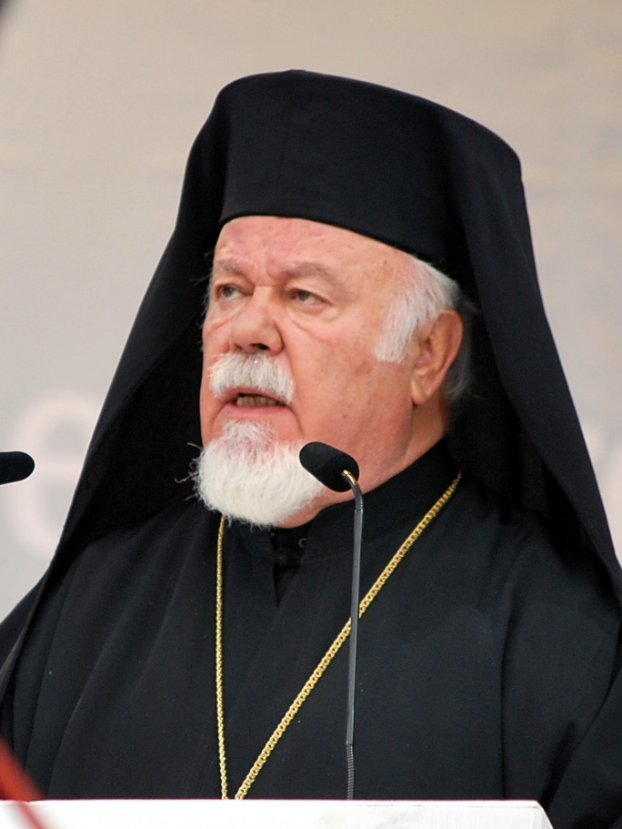 Metropolit Augoustinos spricht zu den zehntausenden Menschen auf der Theresienwiese